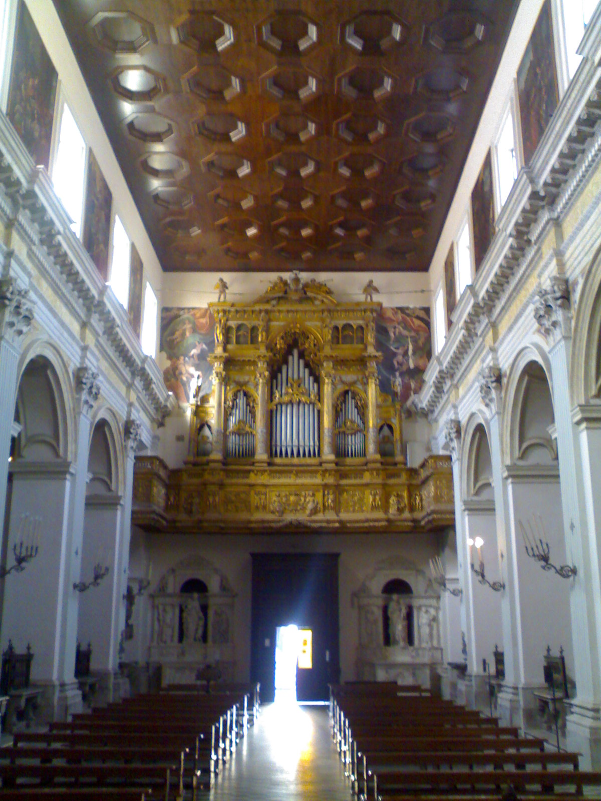 chiesa di sant'anna dei lombardi (napoli)